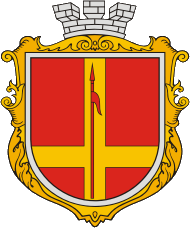 Герб смт Петрове